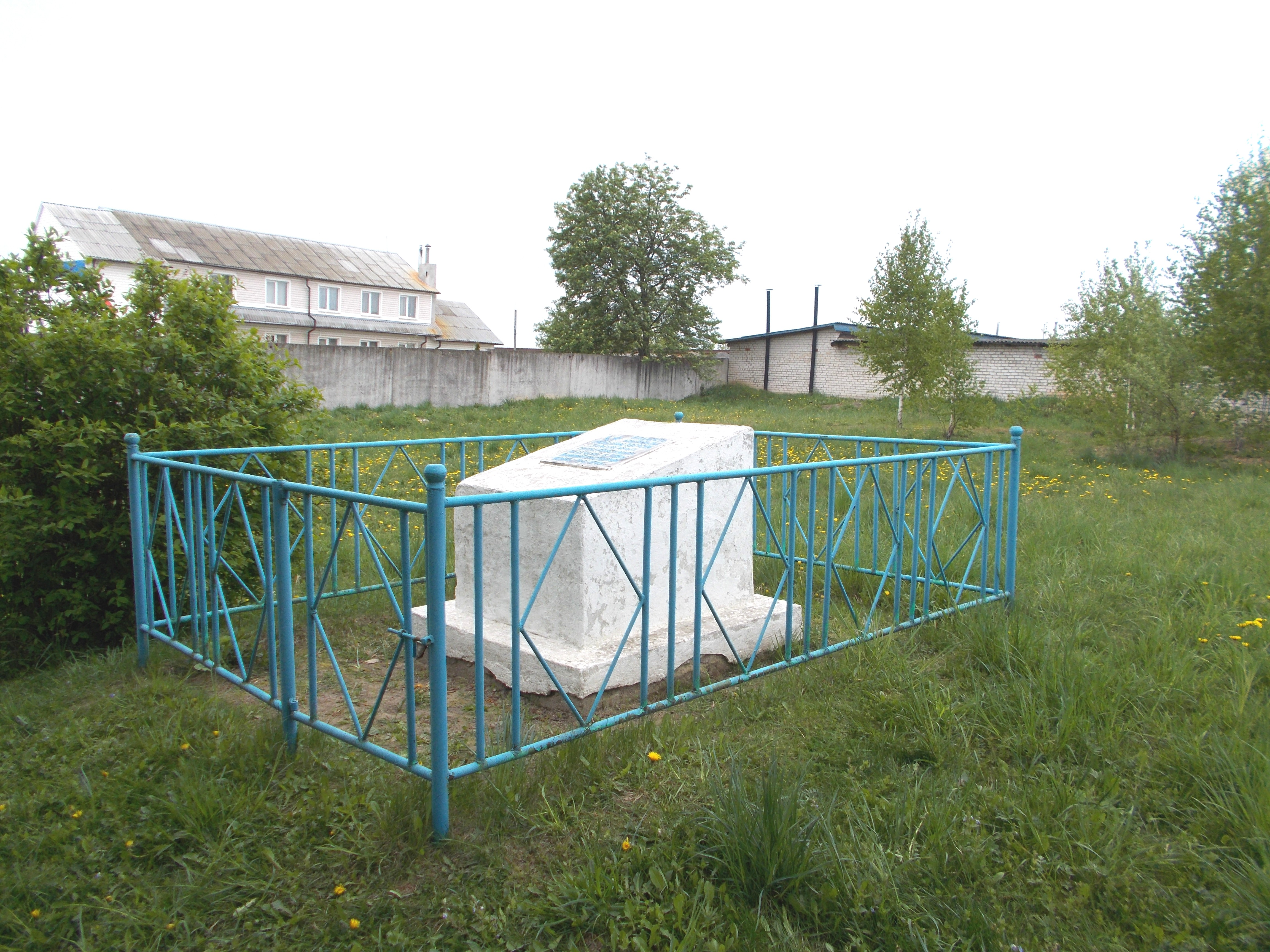 Памятник на одном из мест массовых убийств евреев Воложина во время Холокоста. Находится напротив через дорогу от городской больницы Воложина (улица Горького, 13).